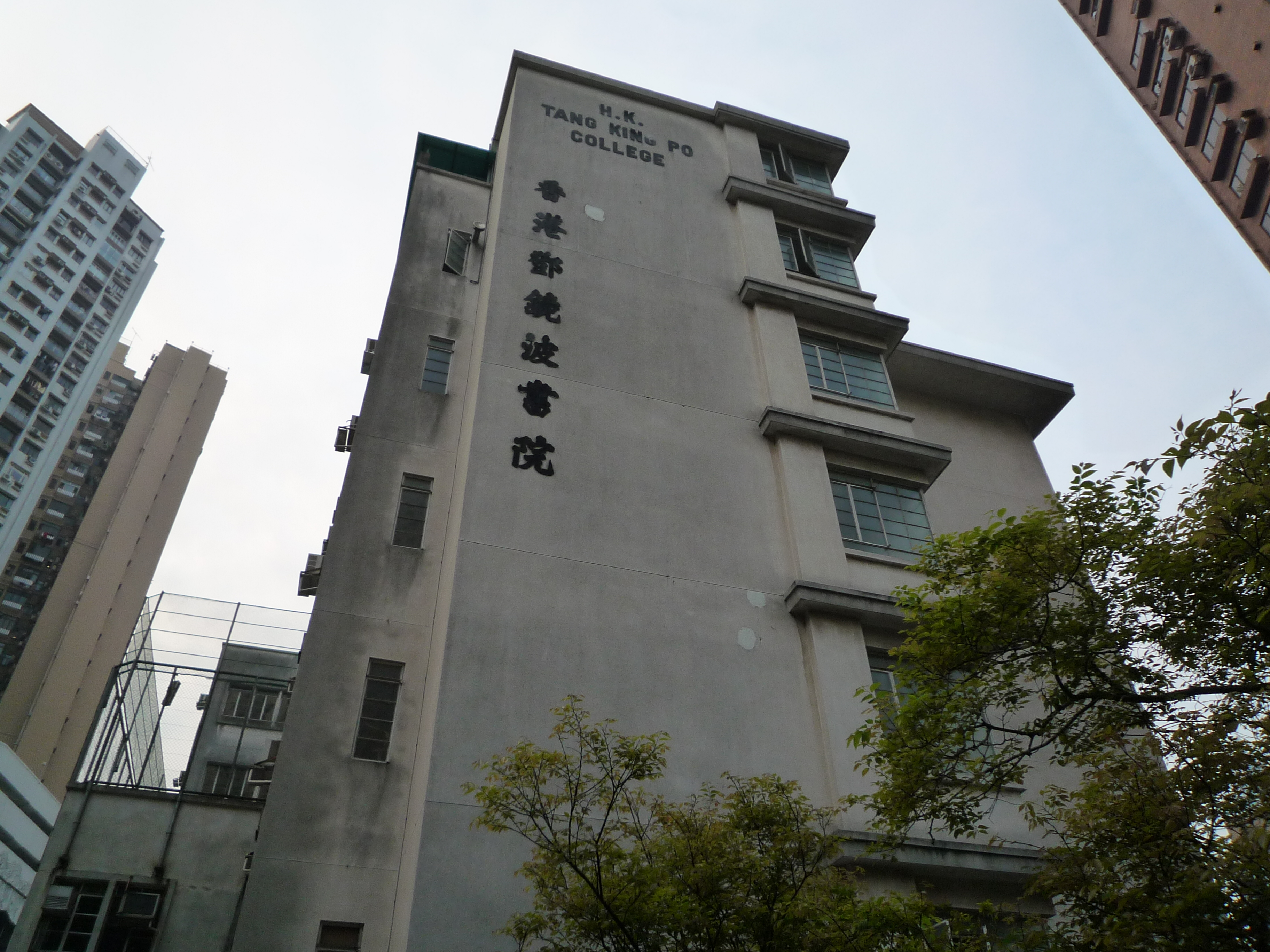 中文（香港）: 香港鄧鏡波書院校舍